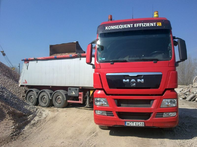 man tgx pod wywrotką